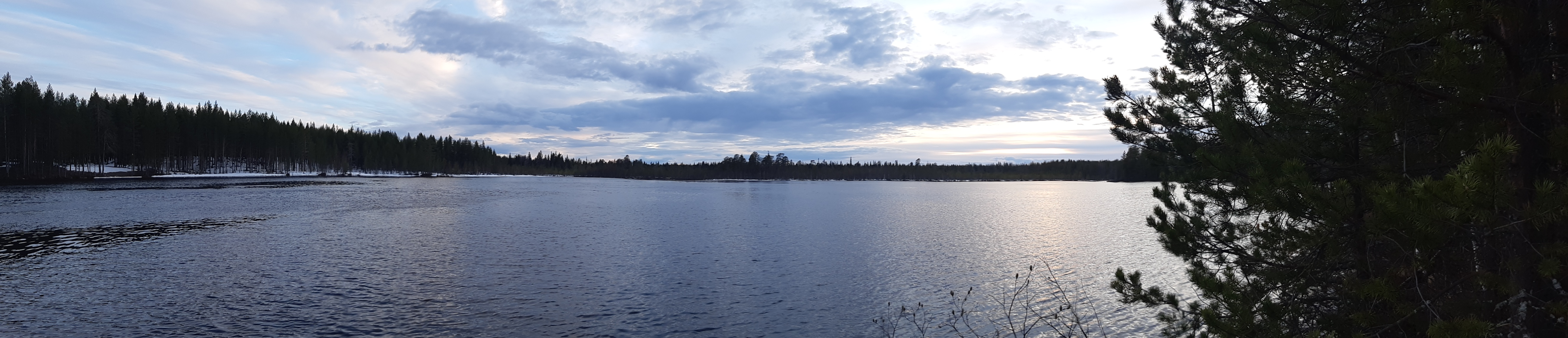 Петриярви